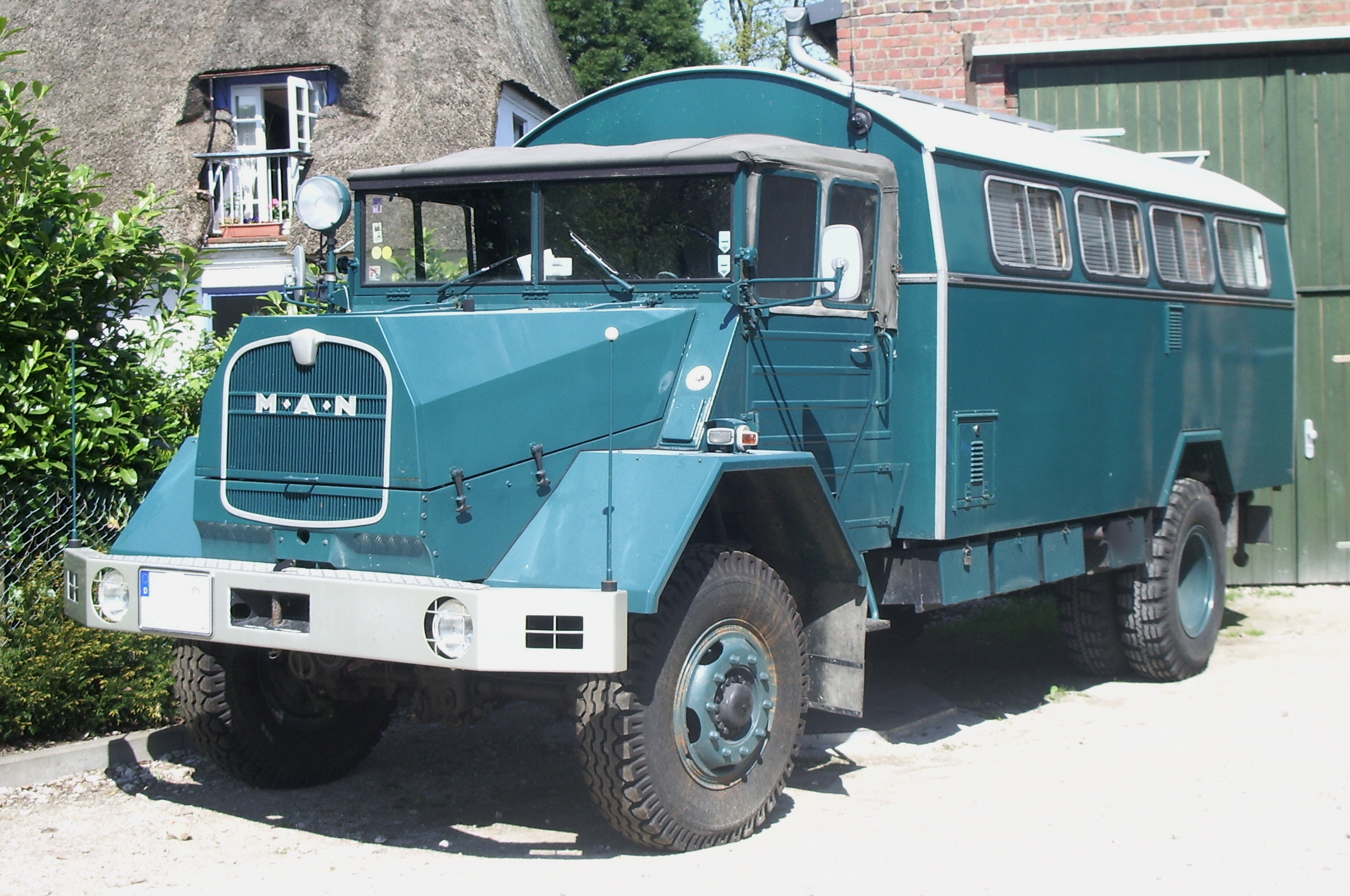 LKW MAN 630 L2A Kommandowagen, Motor: 6 Zylinder 4 Takt Dieselverfahren, 130 PS bei 2000 U/min